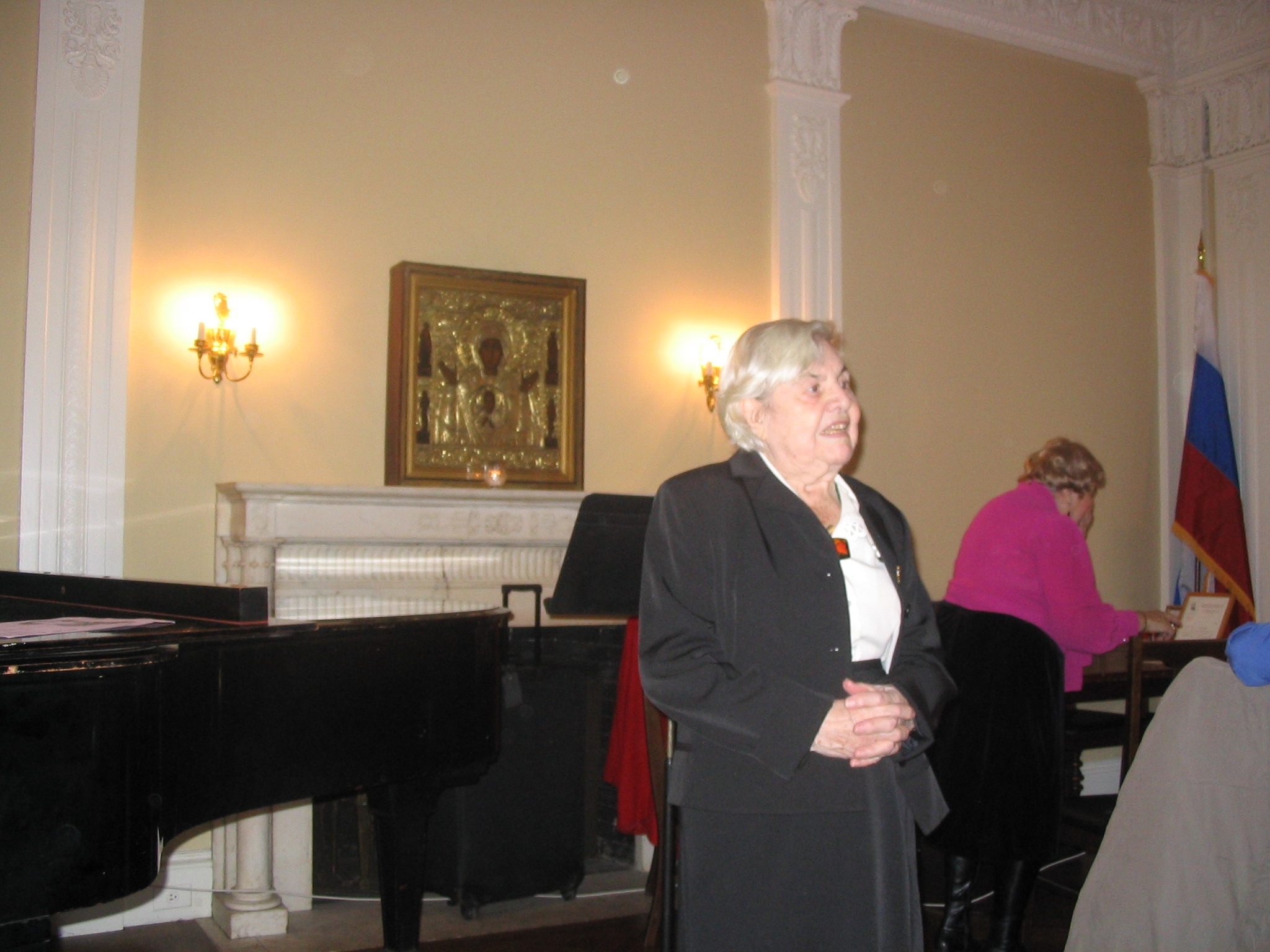 Екатерина Ивановна Лодыженская кандидат исторических наук, директор архива